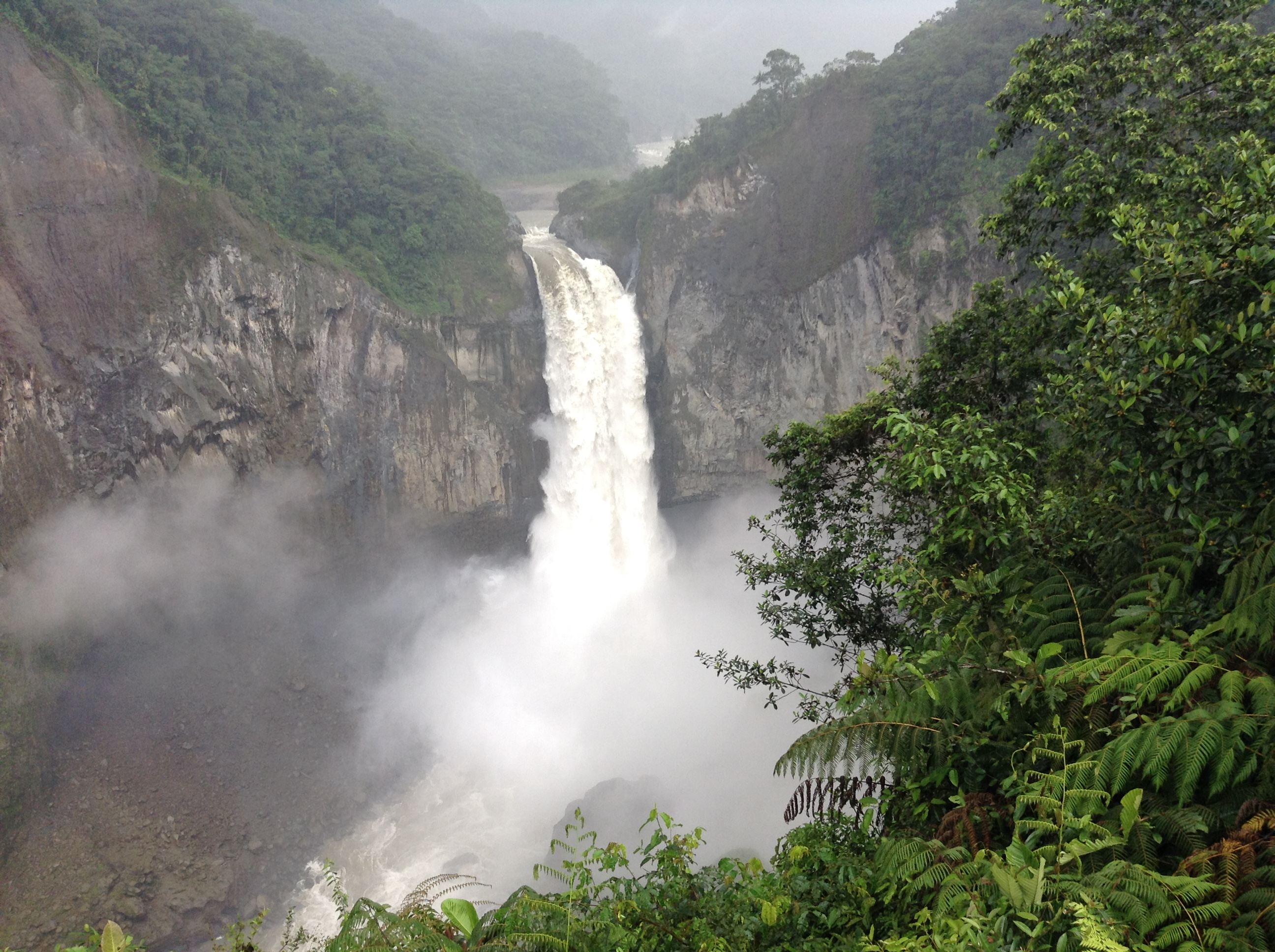 LA KASKADA SAN RAPHAEL